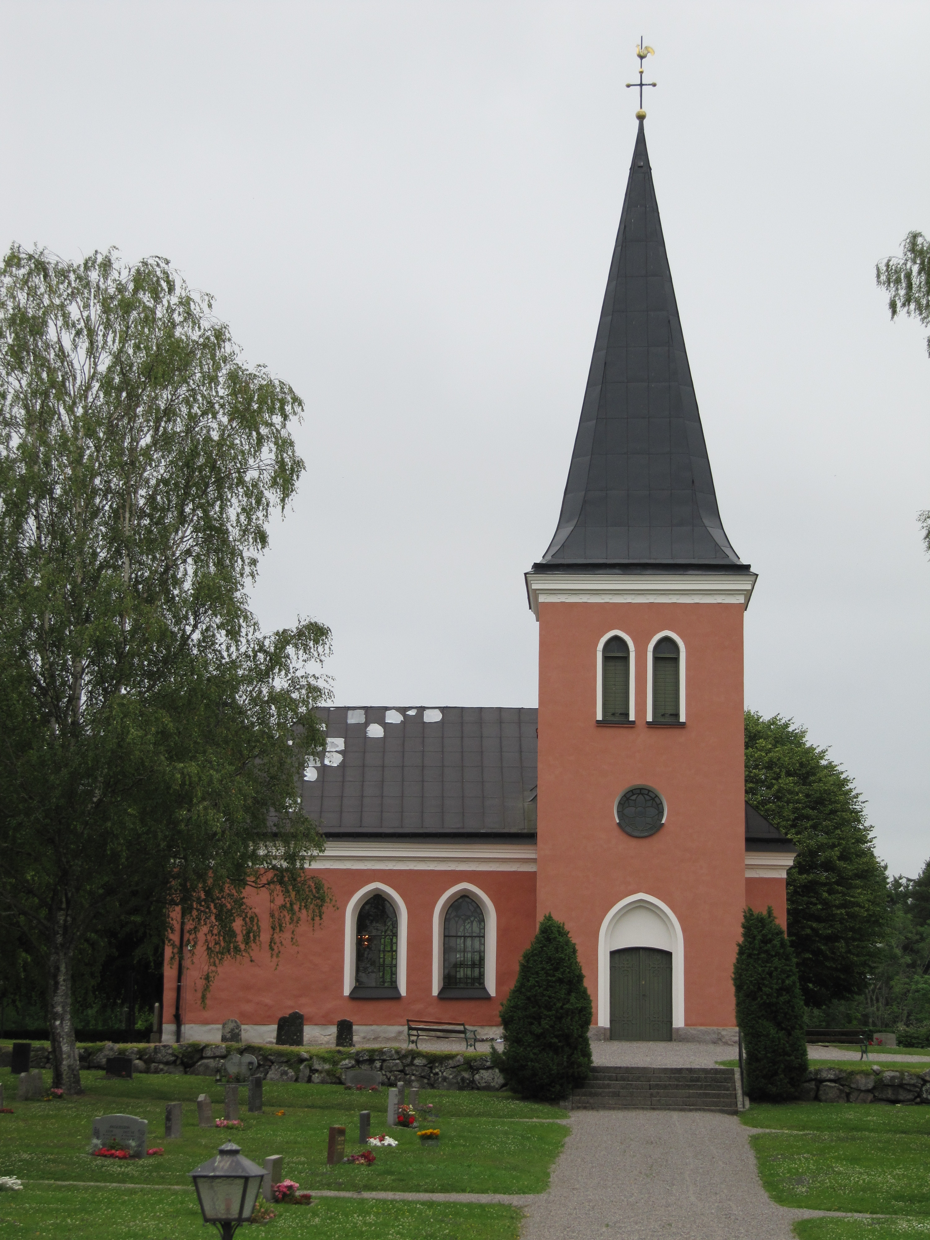 Länna kyrka i Merlänna, Strängnäs kommun, Strängnäs stift